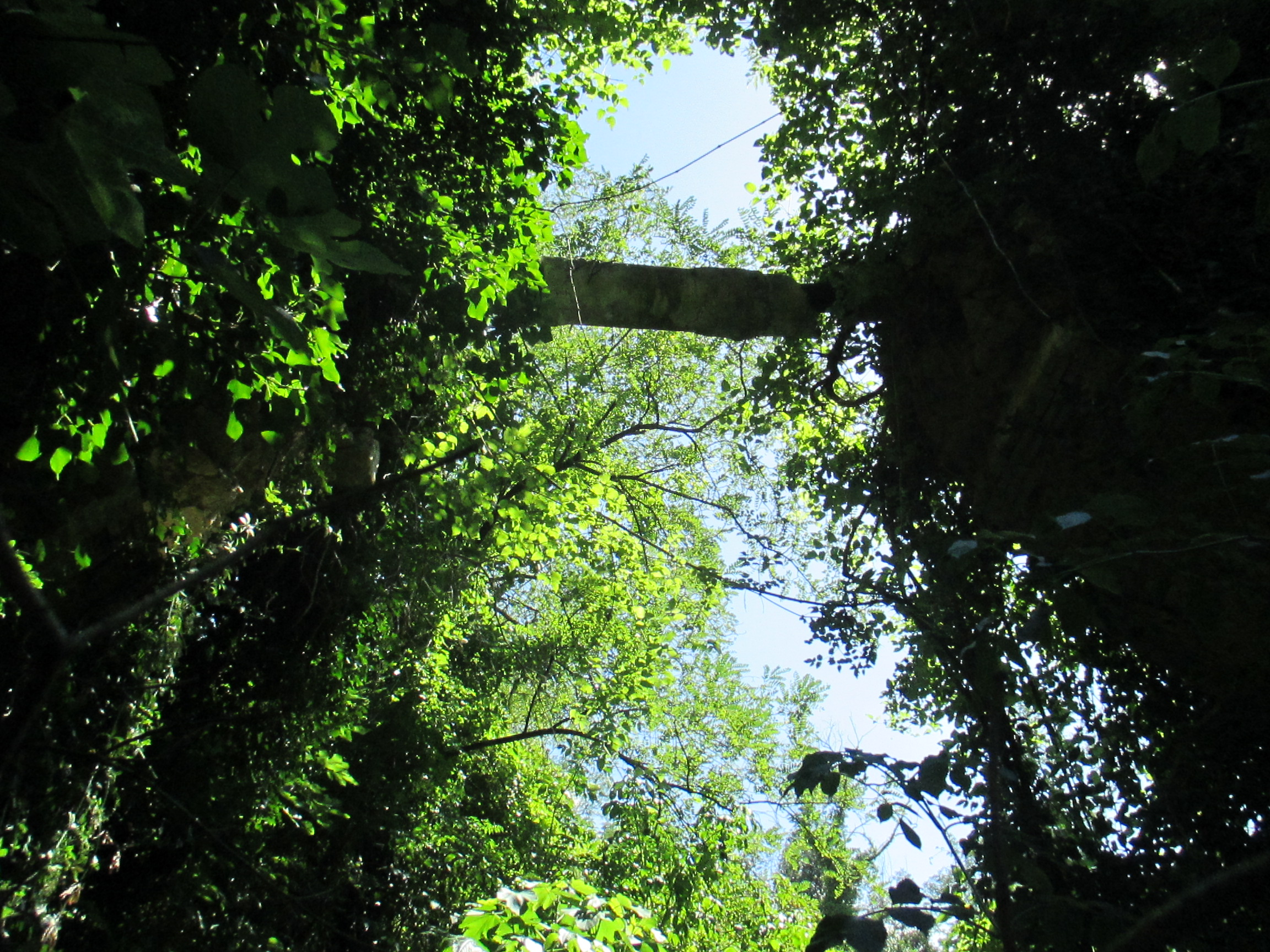 Acquedotto di Colognole, particolare delle arcate della Castellaccia, nel territorio comunale di Collesalvetti, dove la vegetazione sta distruggendo le arcate monumentali delle condotte. Nella foto la tubazione della condotta sospesa nel vuoto dopo il crollo di un'arcata monumentale. L'acquedotto è proprietà del Comune di Livorno e la proprietà si estende su due fasce di rispetto ai lati del manufatto. Ciò nonostante il monumento è lasciato in abbandono.